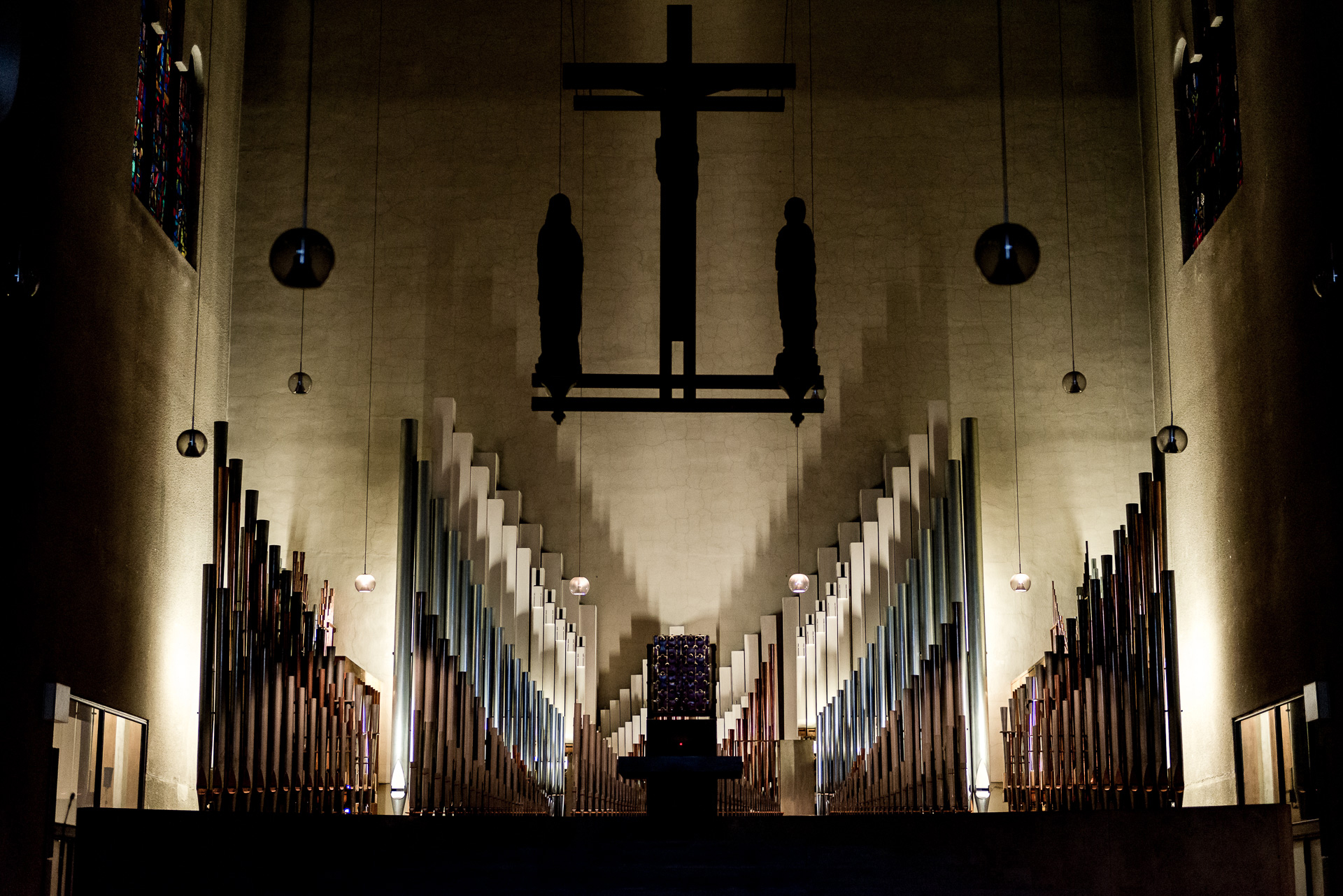 Prospekt der Klais-Orgel von 1954 in St. Paulus, Düsseldorf - Düsseltal